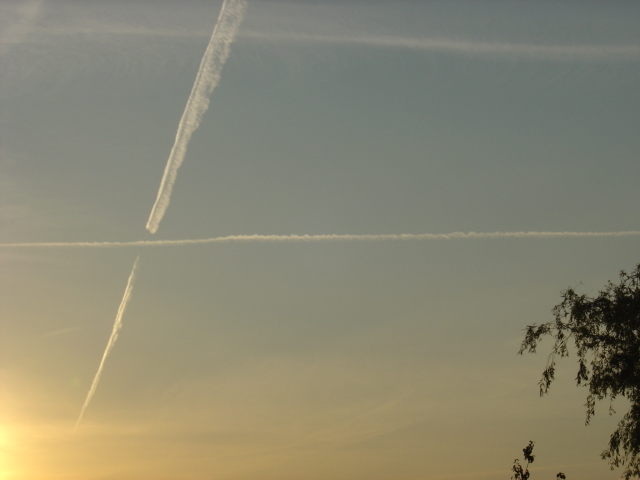 Luchtwegen, eigen foto vanuit de tuin. (Wie goed kijkt heeft meteen een zichtbare aanwijzing van het opwarmen van de atmosfeer...)